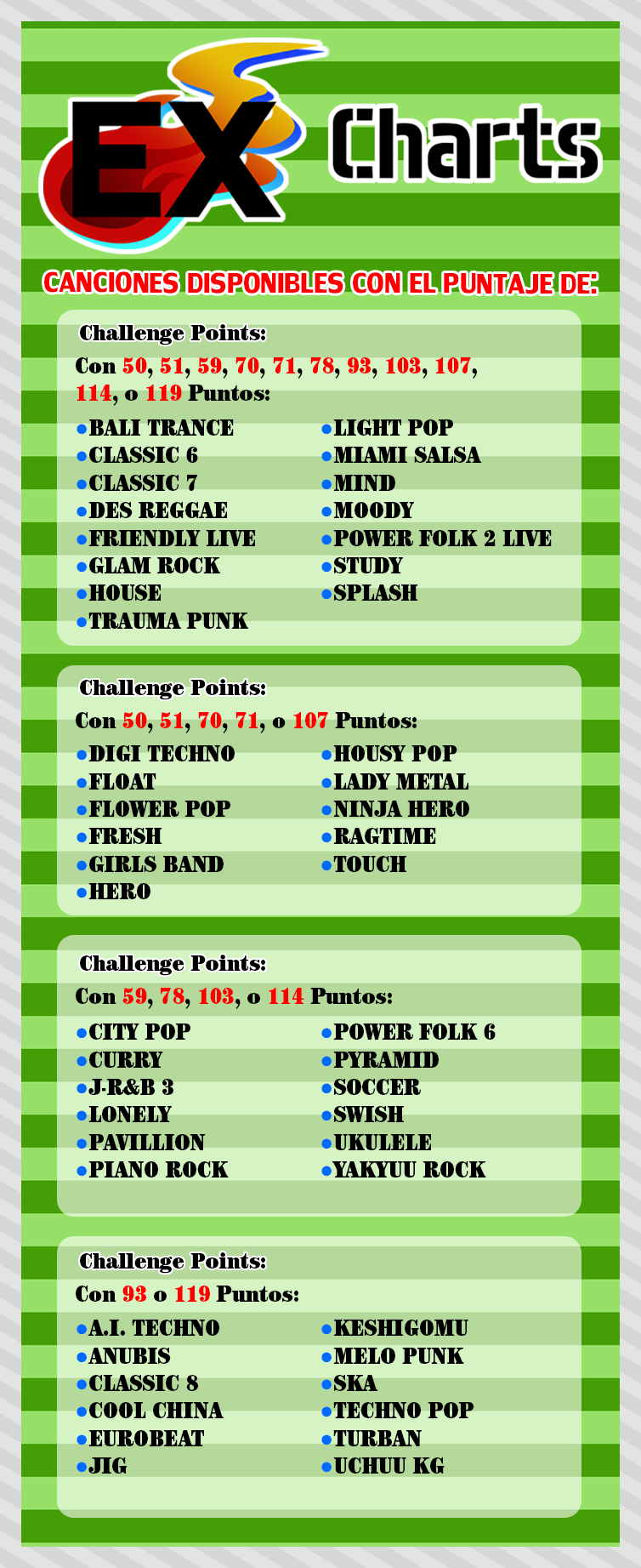 Imagen descriptiva de CP disponibles en el videojuego.